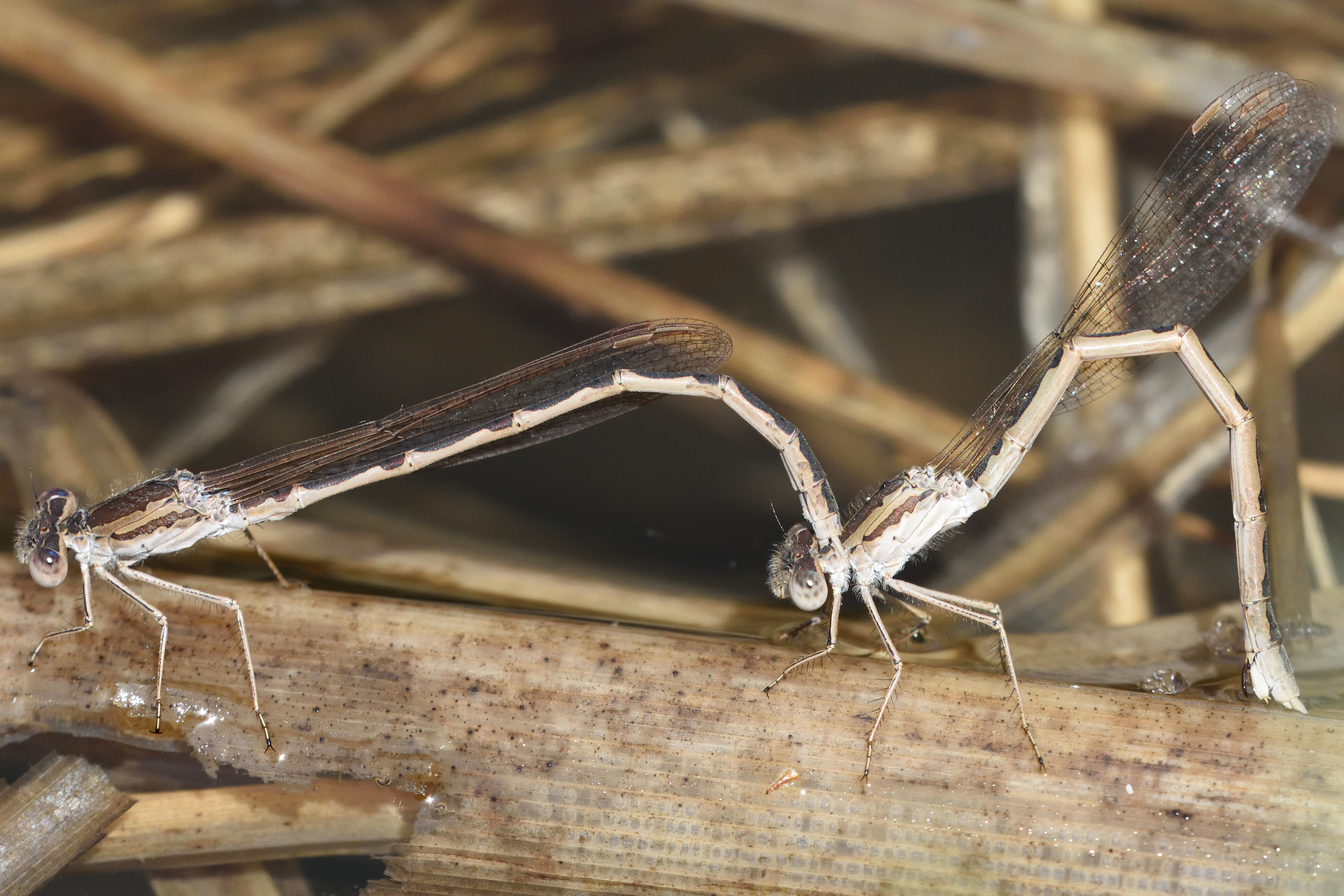 オツネントンボ産卵 広島県 2019.04.16